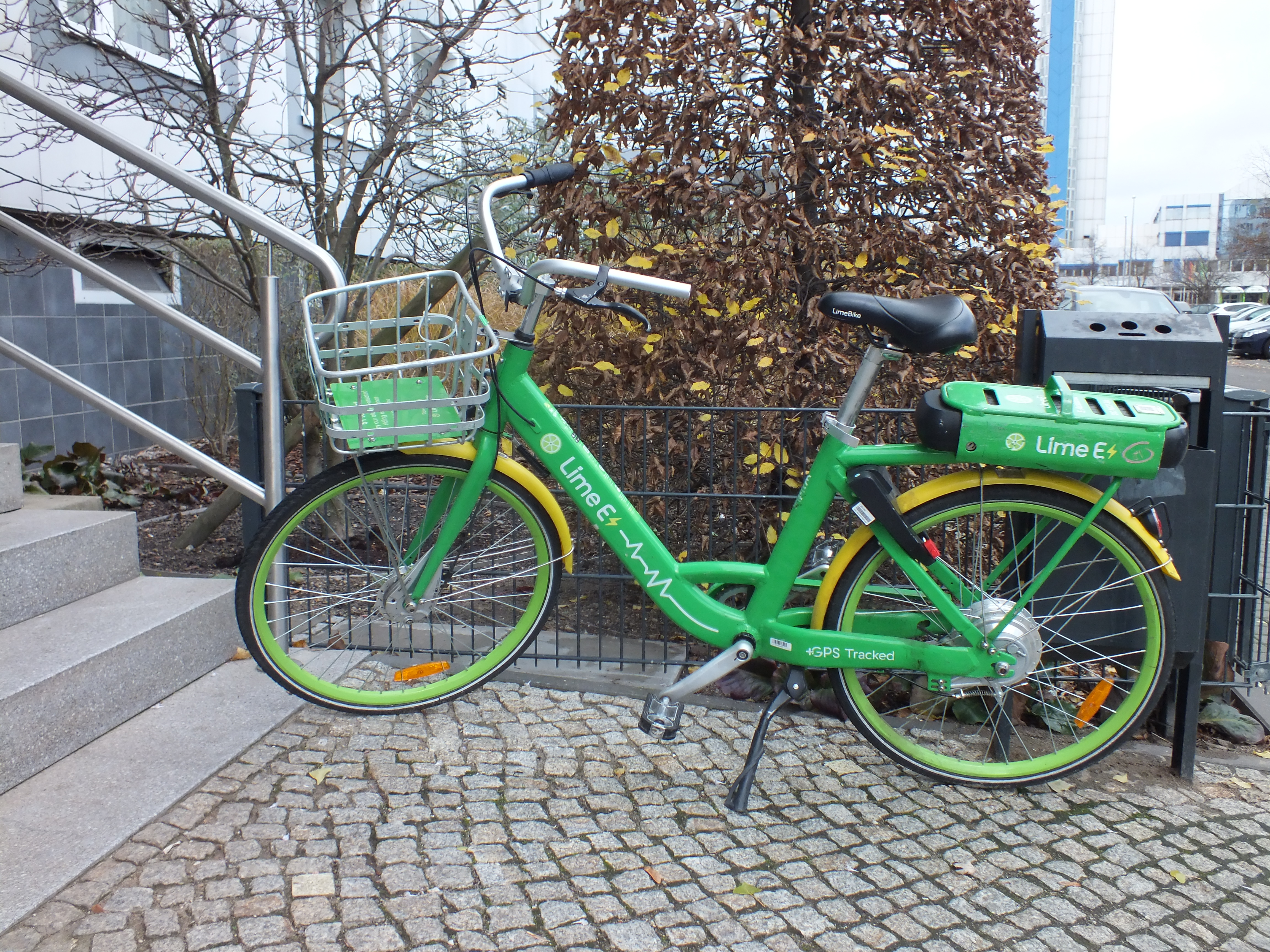 Fahrradleihstation LimeBike in Berlin